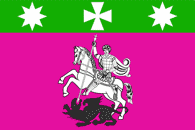 Флаг Ирклиевского сельского поселения, Краснодарский край, Россия.